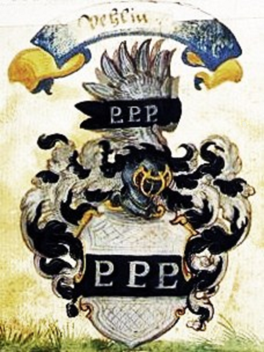 Stammwappen der Vöhlin, der erfolgreichsten Handels- und Patrizierfamilie der ehemals freien Reichsstadt Memmingen, seit dem 13. Jahrhundert urkundlich.